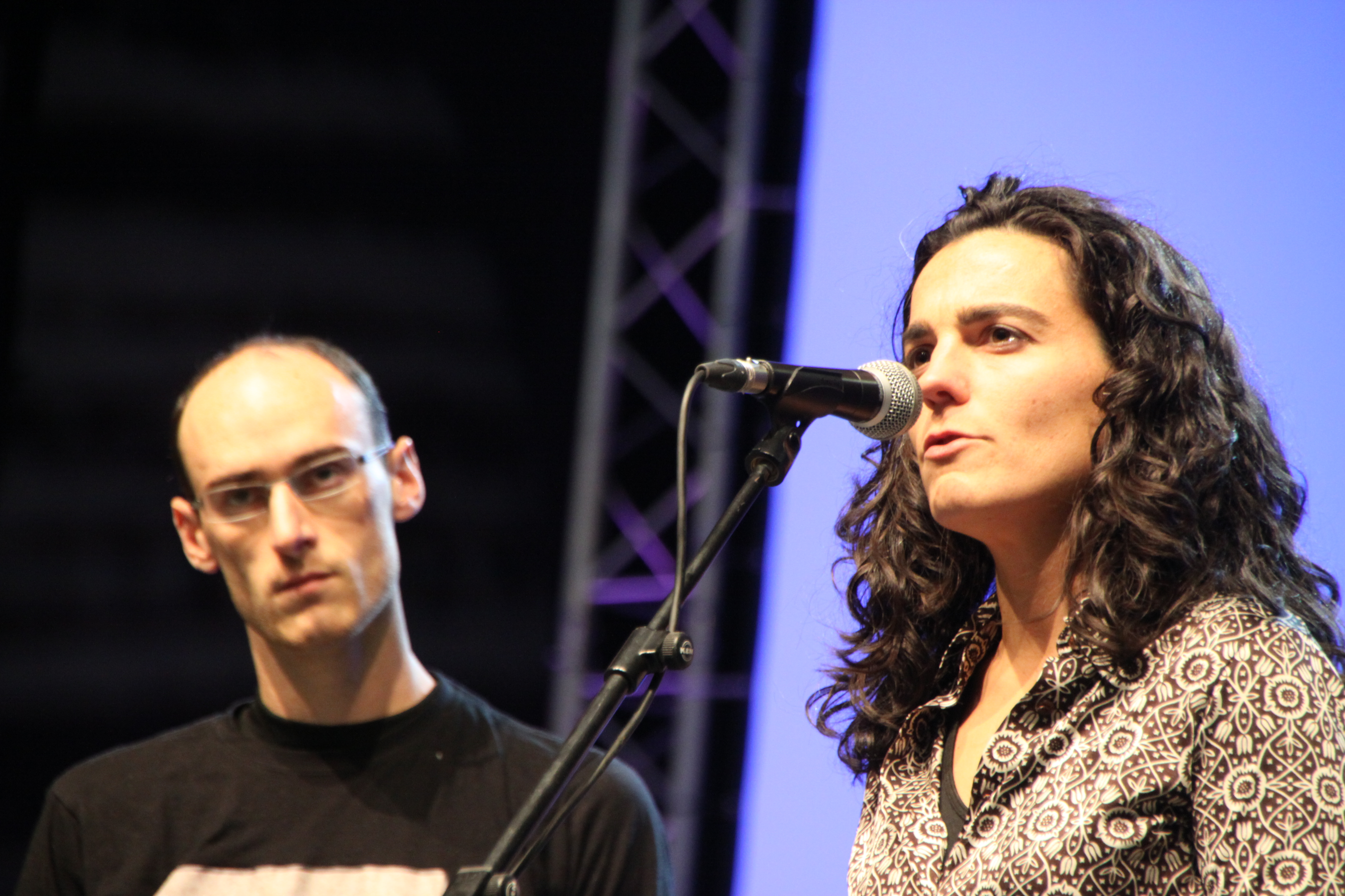 2013ko abenduaren 15ean jokatu zen Barakaldoko BECen Bertsolari Txapelketa Nagusia. Maialen Lujanbio, Aitor Mendiluze, Amets Arzallus, Sustrai Colina, Aitor Sarriegi, Beñat Gaztelumendi, Igor Elortza eta Unai Iturriaga igo ziren oholtzara, 13.500 bertsozaleren aurrean. Amets Arzallus nagusitu zen eta txapela eskuratu zuen. Bertsolari Txapelketa Nagusia 2017. Egilea: Uribe Kosta eta Erandioko agerkaria.